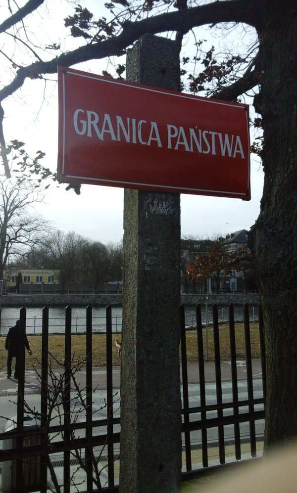 Przykładowa tablica z granicą państwa. Muzeum Oręża Polskiego w Kołobrzegu.